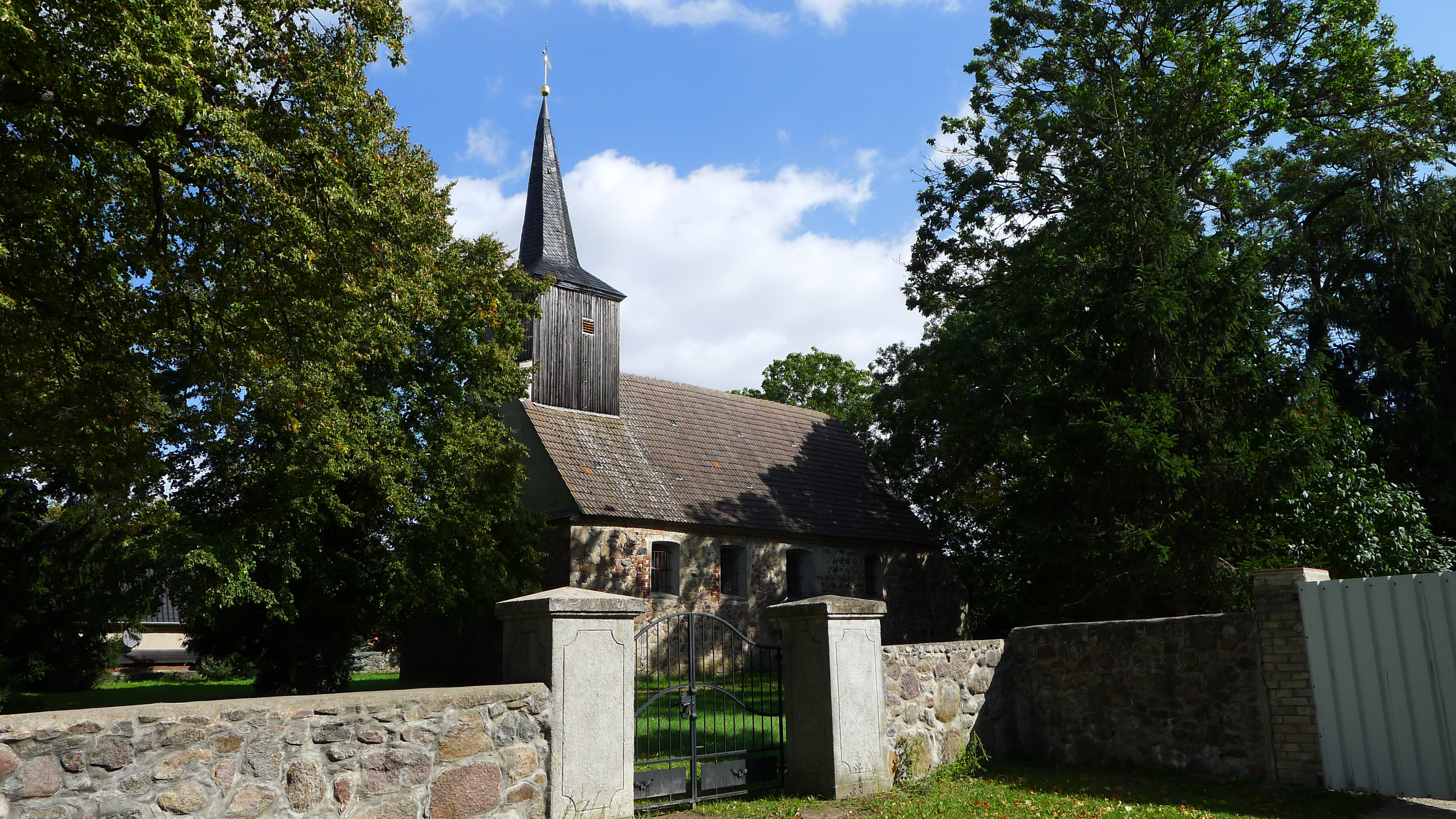 Dorfkirche in 16278 Angermünde OT Herzsprung, Lindenstraße 1